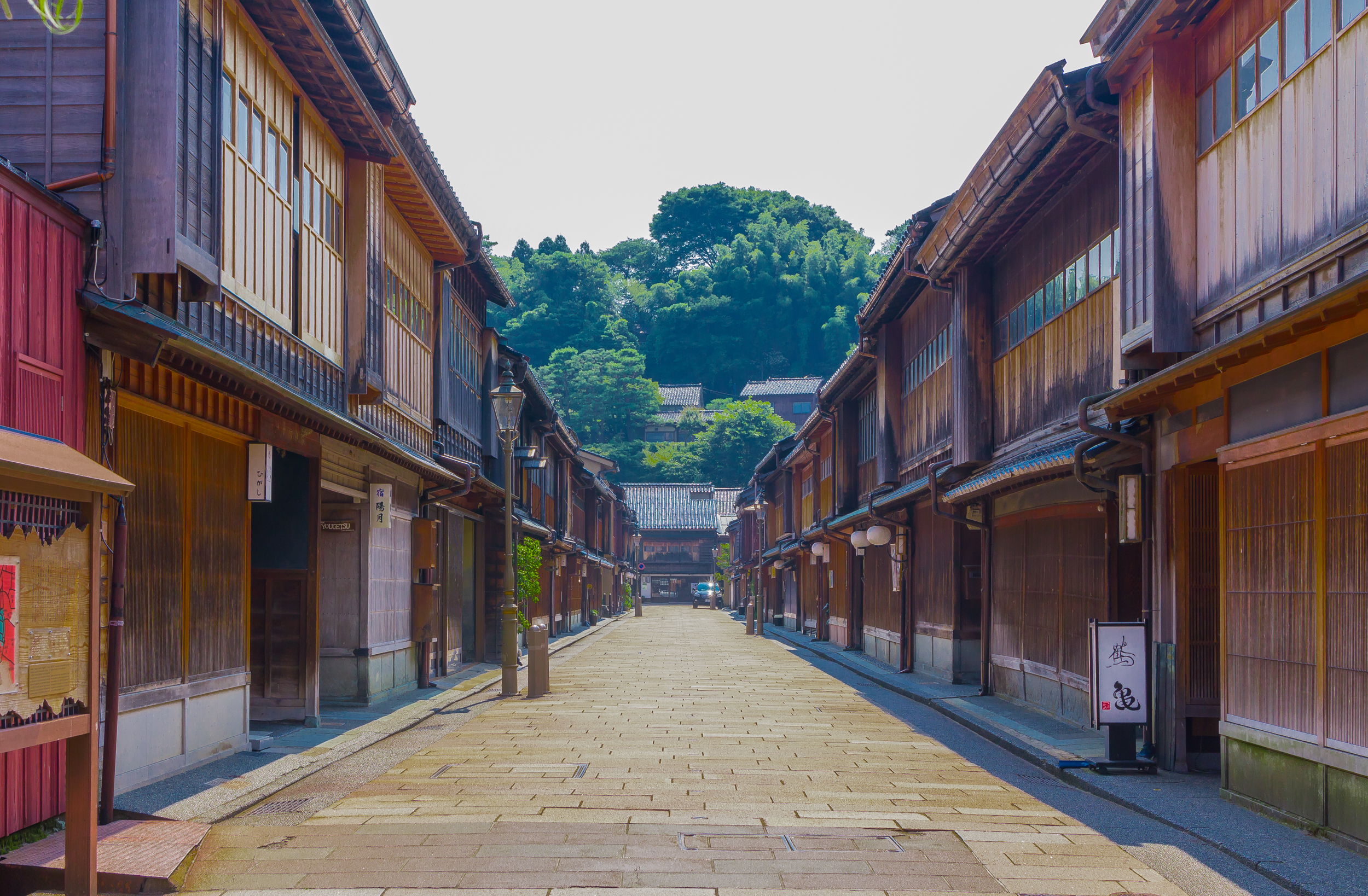 東山ひがし(石川県金沢市)